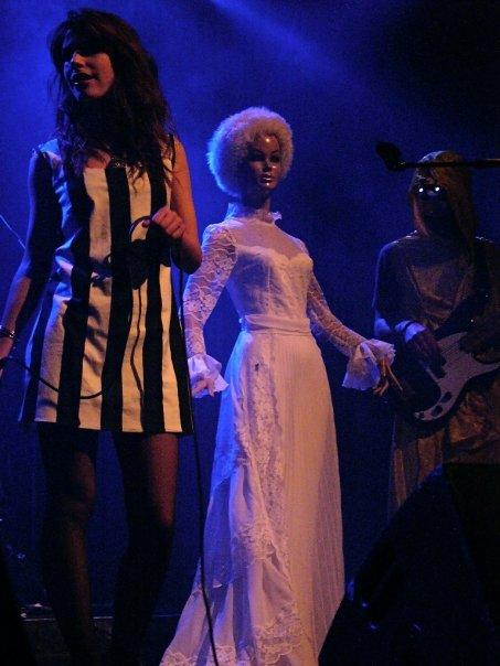 Concert de Giallo Queens à Turin en 2007.